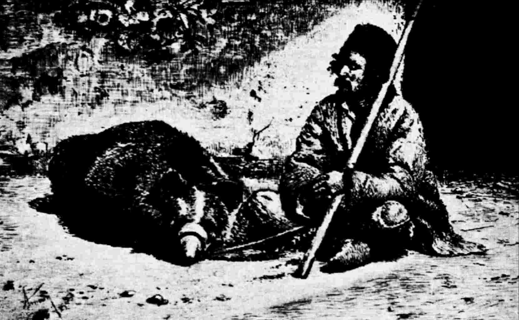 Ursarul